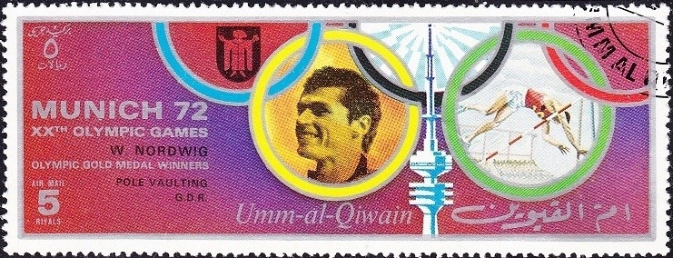 Wolfgang Nordwig